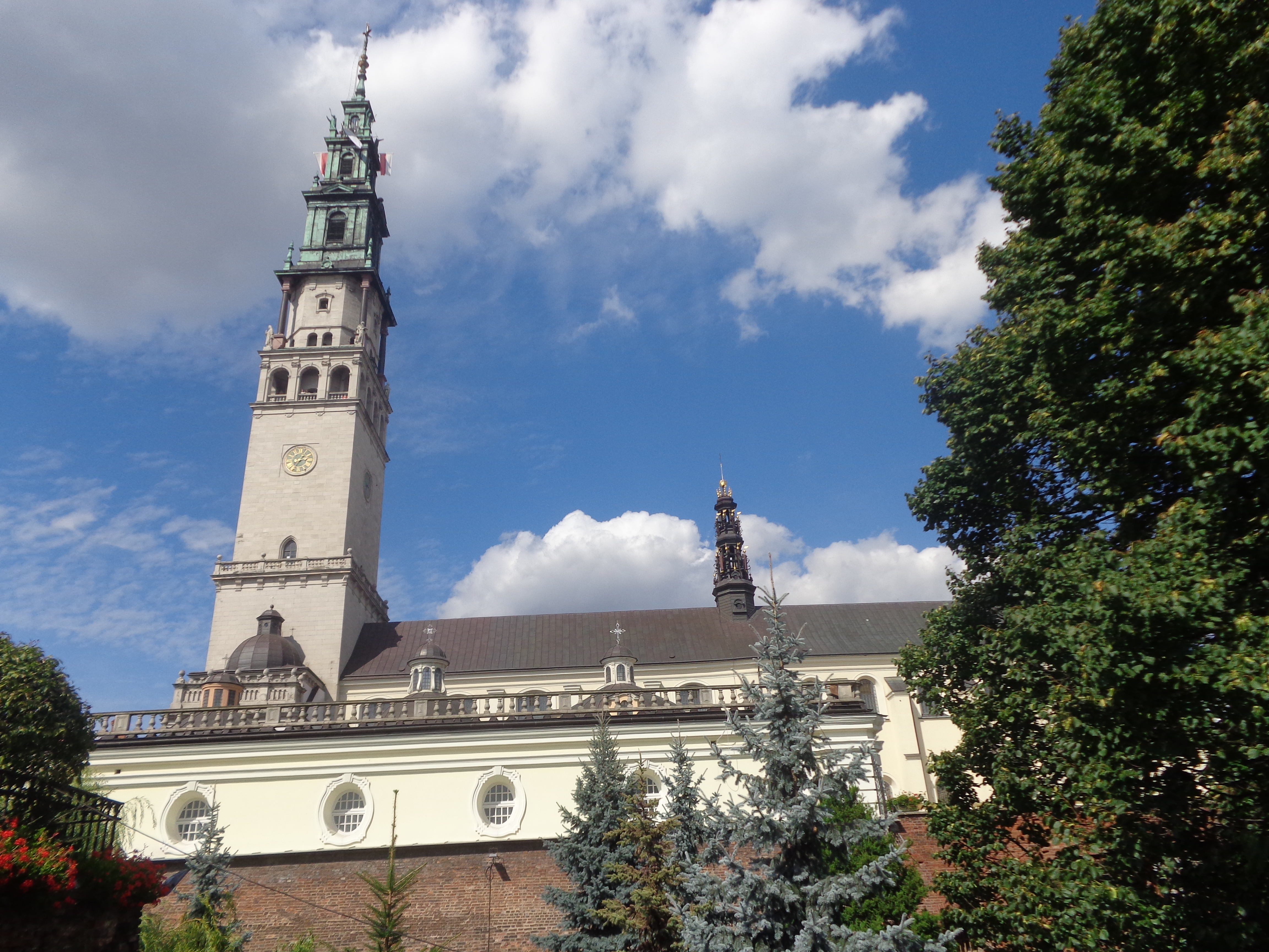 Częstochowa, zespół klasztorny oo. Paulinów na Jasnej Górze